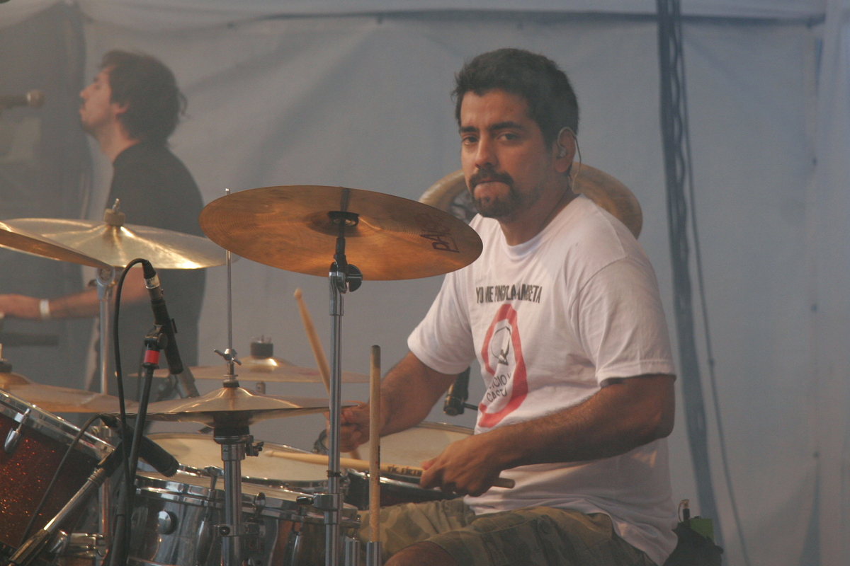 En 1989 editan su disco debut que se llamó Dulce Navidad. ( Foto: Estrella Herrera)